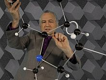 Photo of artist Gary Hill in his work "The Psychedelic Gedankenexperiment," 2011, photo construction by the artist, (c)2011 Gary Hill, used by permission of the artist.